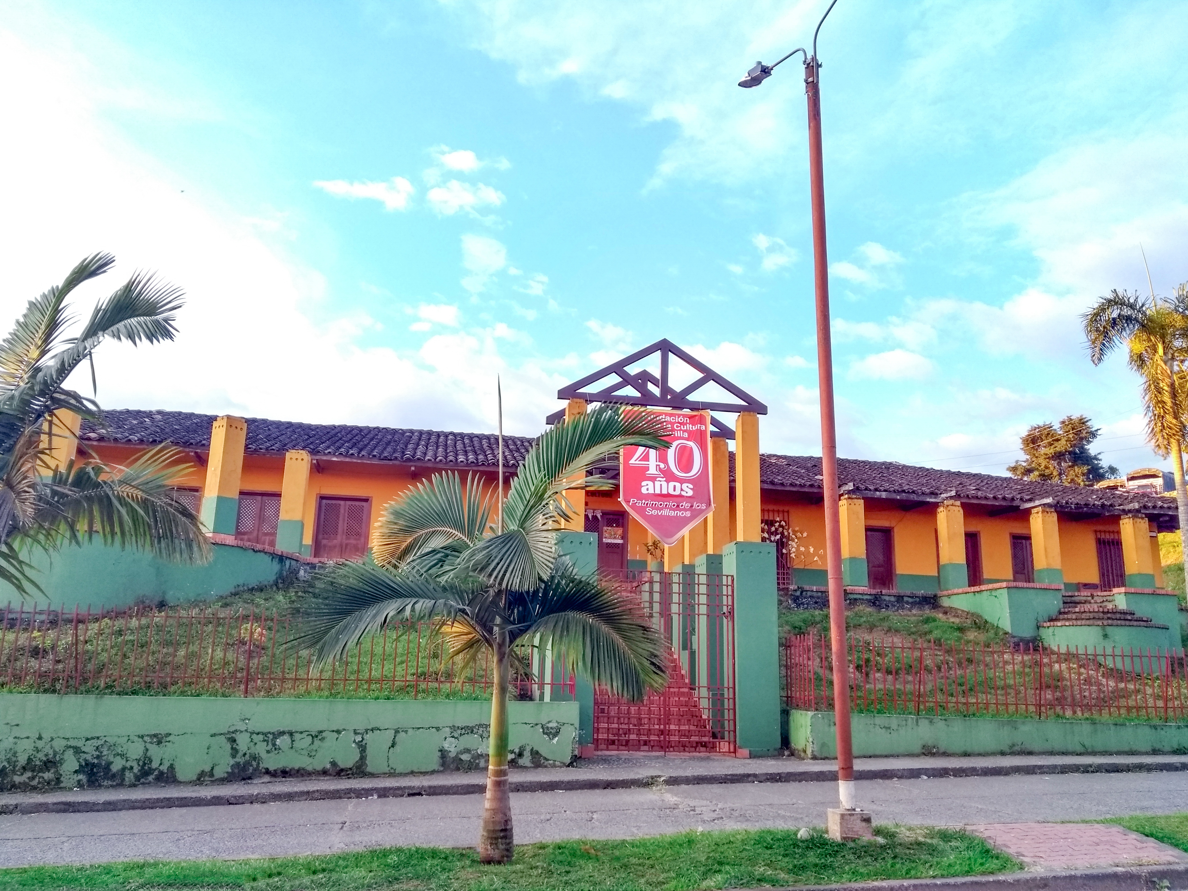 Fotografía Casa de la cultura Sevilla valle